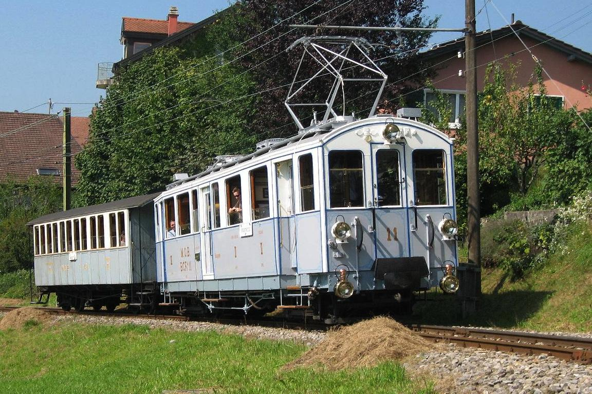 Zwischen Blonay und der Haltestelle Chantemerle bergwärts fahrender Zug der Museumsbahn Blonay–Chamby (BC) auf der Bahnstrecke Blonay–Chamby. Der Zug bestehend aus dem frisch revidierten Triebwagen BCFe 4/4 11 und dem Personenwagen BC4 22 der Montreux–Berner Oberland-Bahn (MOB).